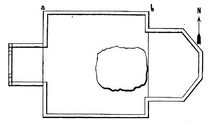 План церкви во имя св.мучеников Бориса и Глеба, существовавшей в XIX в. в селе Голошевка над Рогволодовым камнем. Составлен Кеппеном П.И. Из чертежа видно как камень лежал в церкви. Длина линии ab, по сведениям автора, составляет 22 англ. фута или 9 и 3/7 аршина.